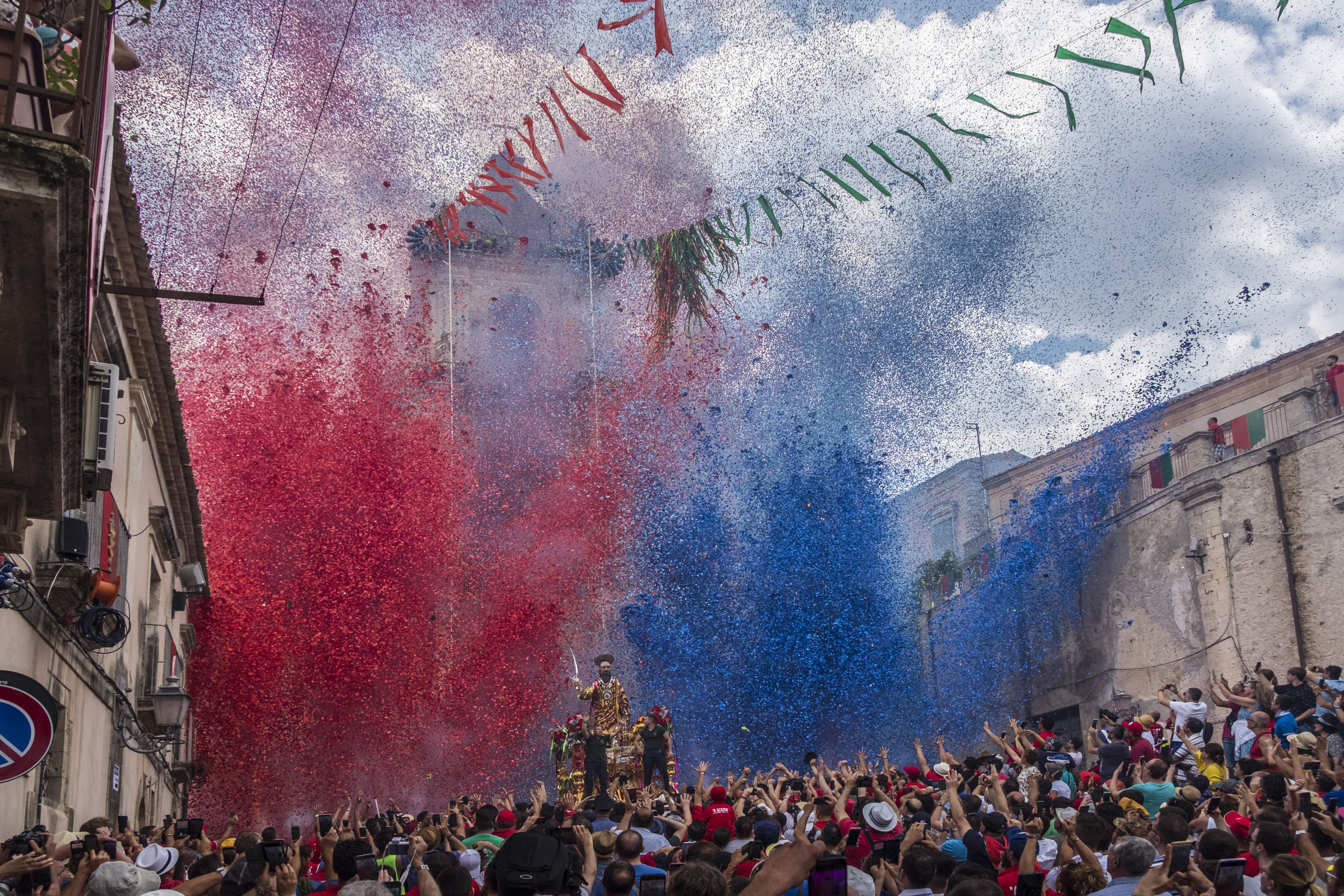 Uscita del fercolo col Santo